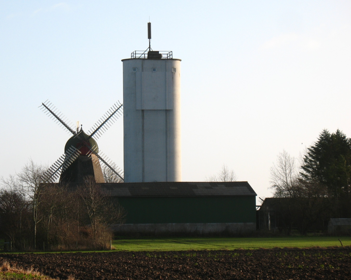 Uggerslev Mølle, Petersmindevej 12, Otterup Eget foto, Noorse Licentie: CC-BY-SA-3.0 Forminsket versjon for Wikipedia